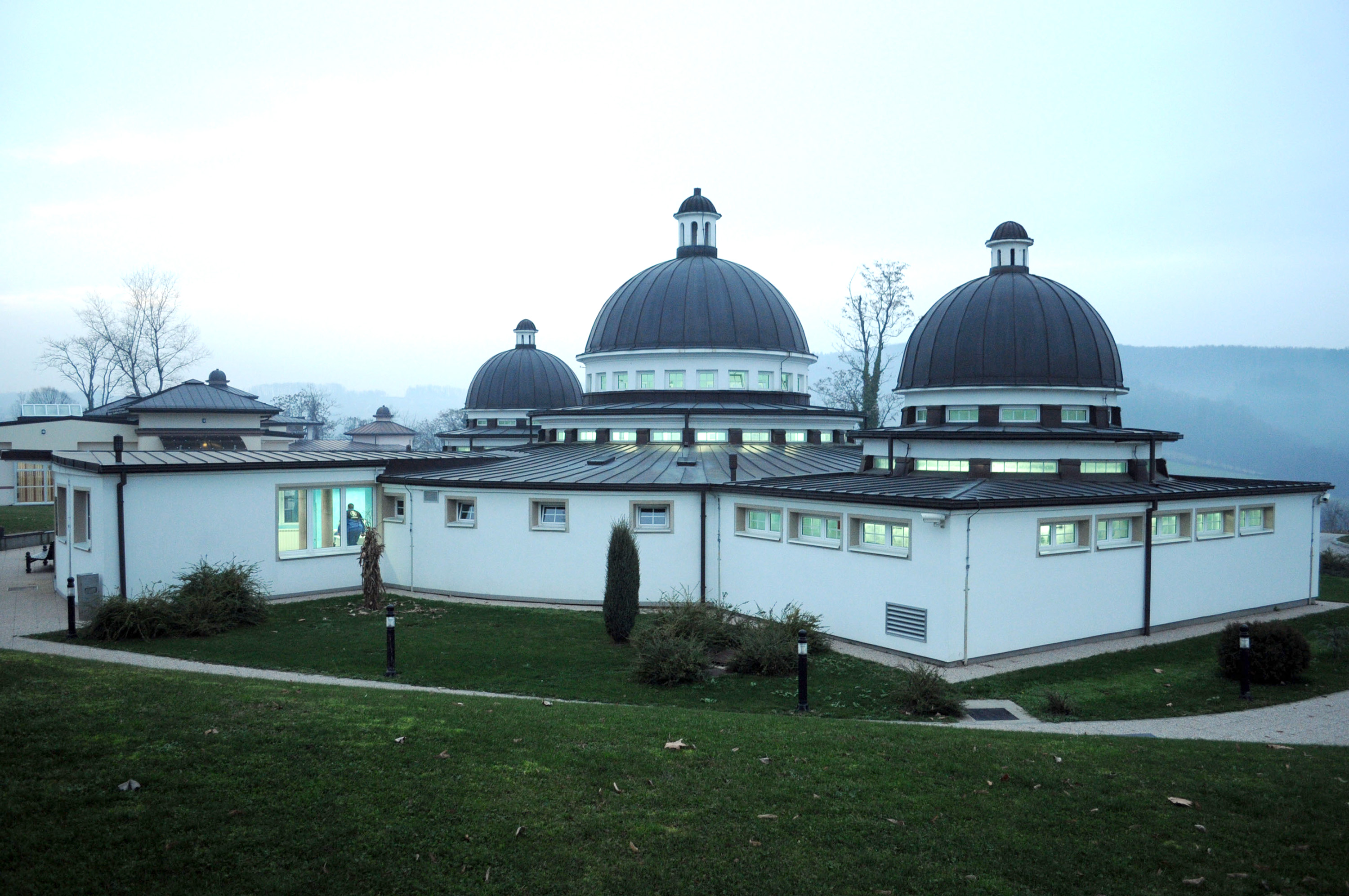 Opstina Laktasi Objekat vrela termonineralne vode u slatinskom parku slatina Сликава е подигната во рамките на проектот „По трагата на душата 2015“.